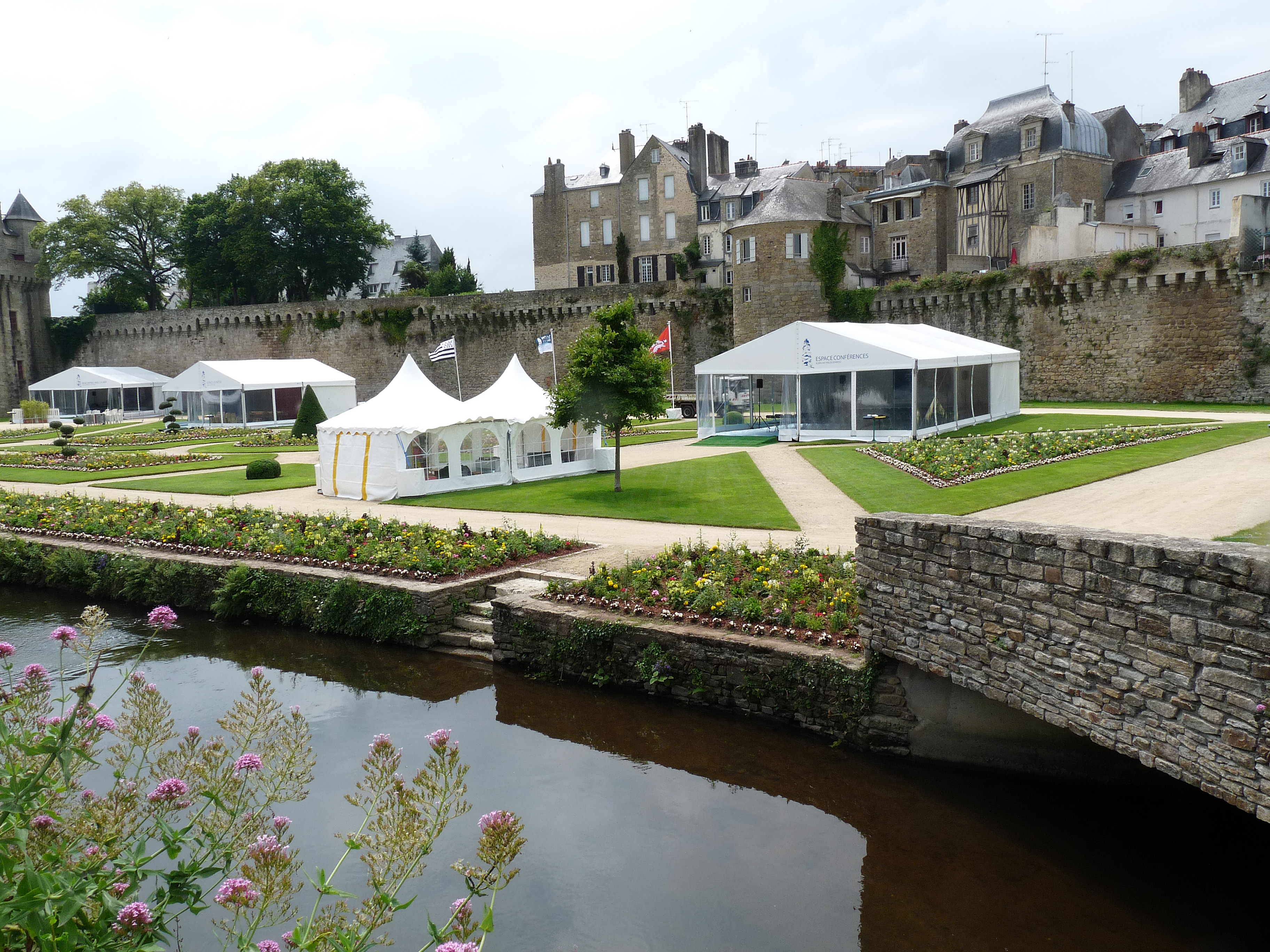 Vannes (Morbihan) : chapiteaux du Salon du livre en Bretagne dans le jardin des Remparts